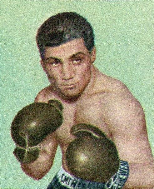 CAMPIONI dello SPORT 1968/69-n.322- ROJAS - PUGILATO (USA)